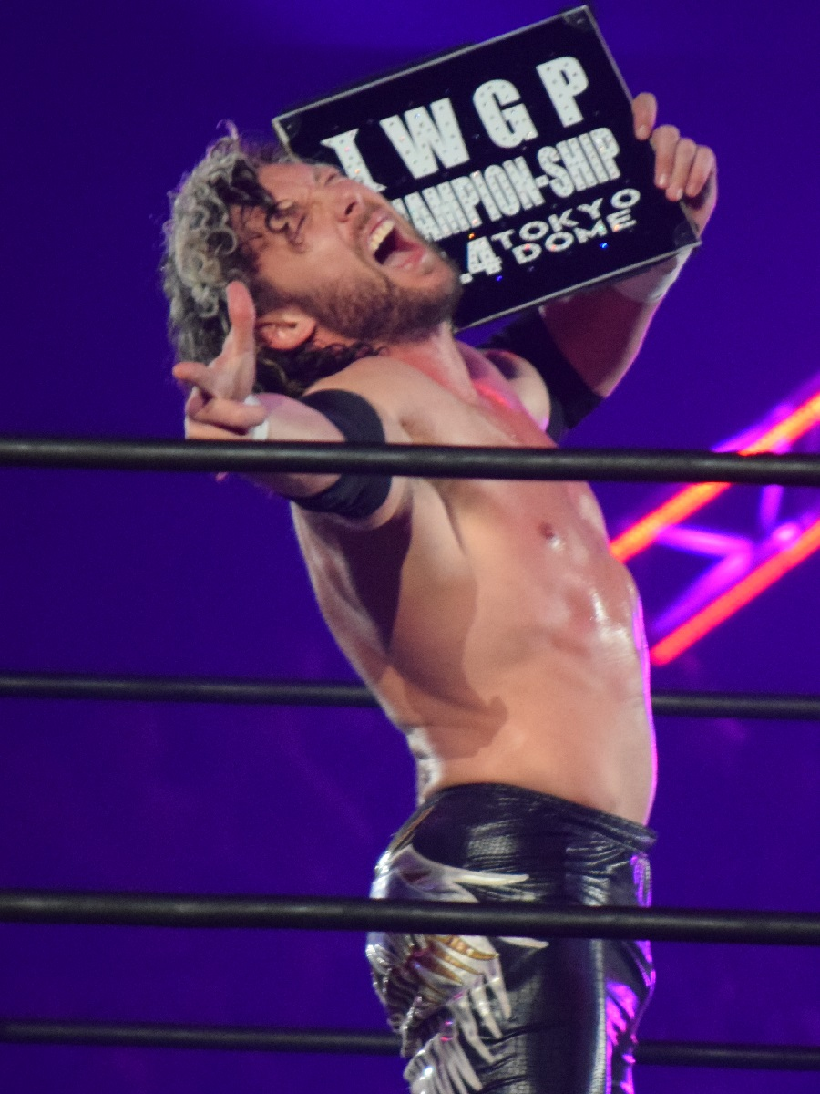 2016年11月5日 大阪府立体育会館「POWER STRUGGLE」 ケニー・オメガ